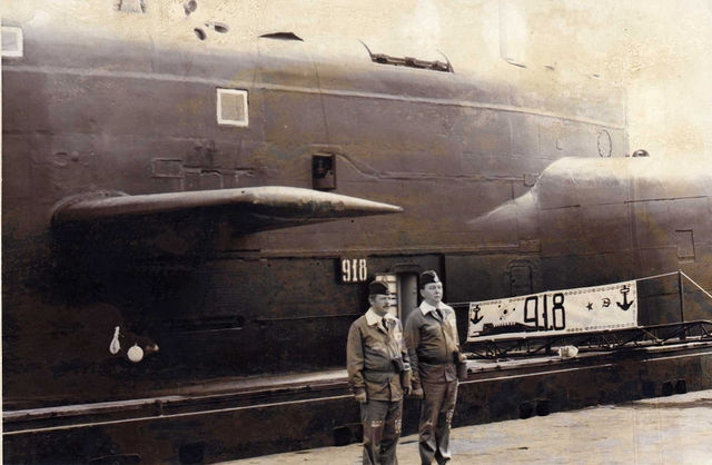 1988 год.ЗКПЧ К2Р Абрамов,КПЛ К1РЖуренков